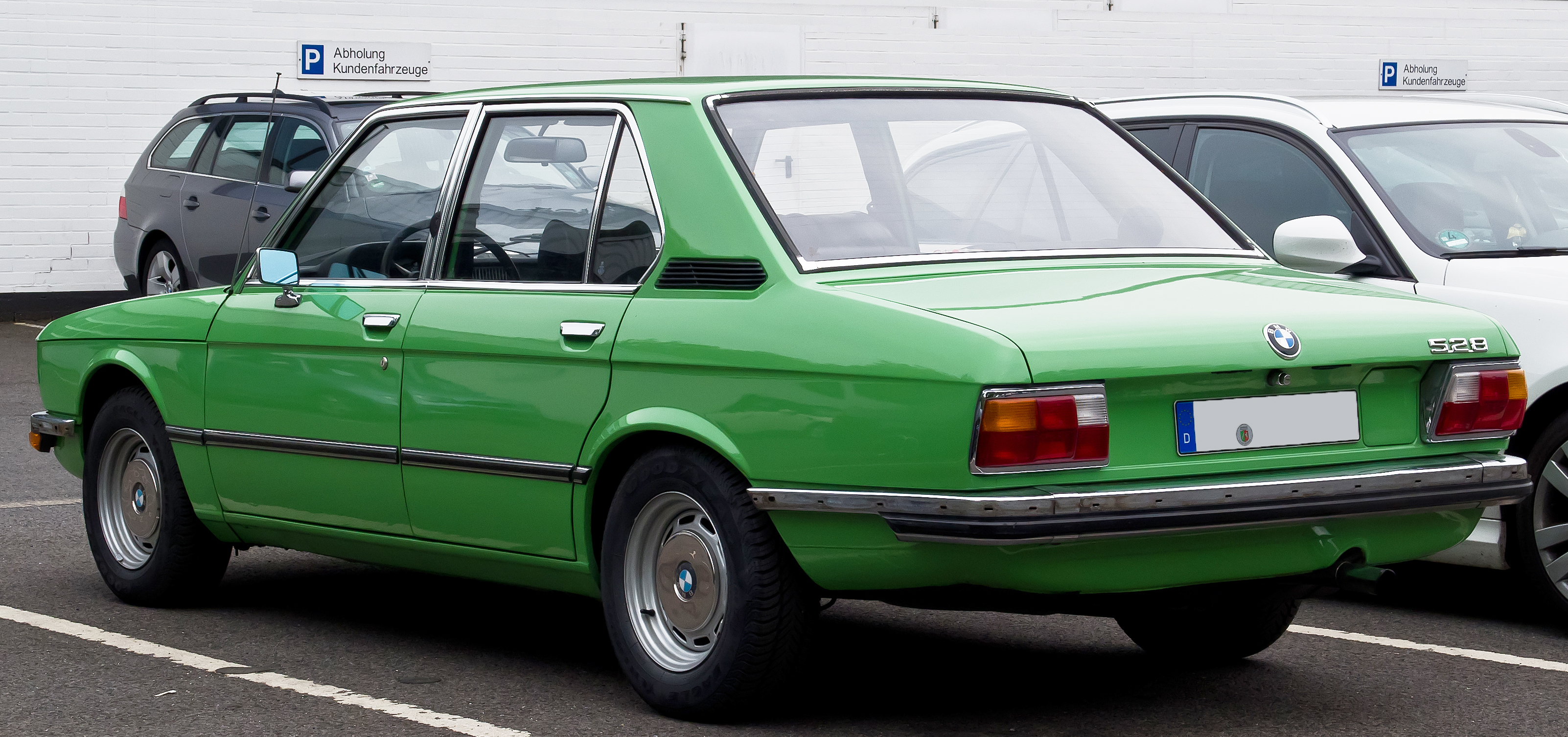 BMW 528 (E12)